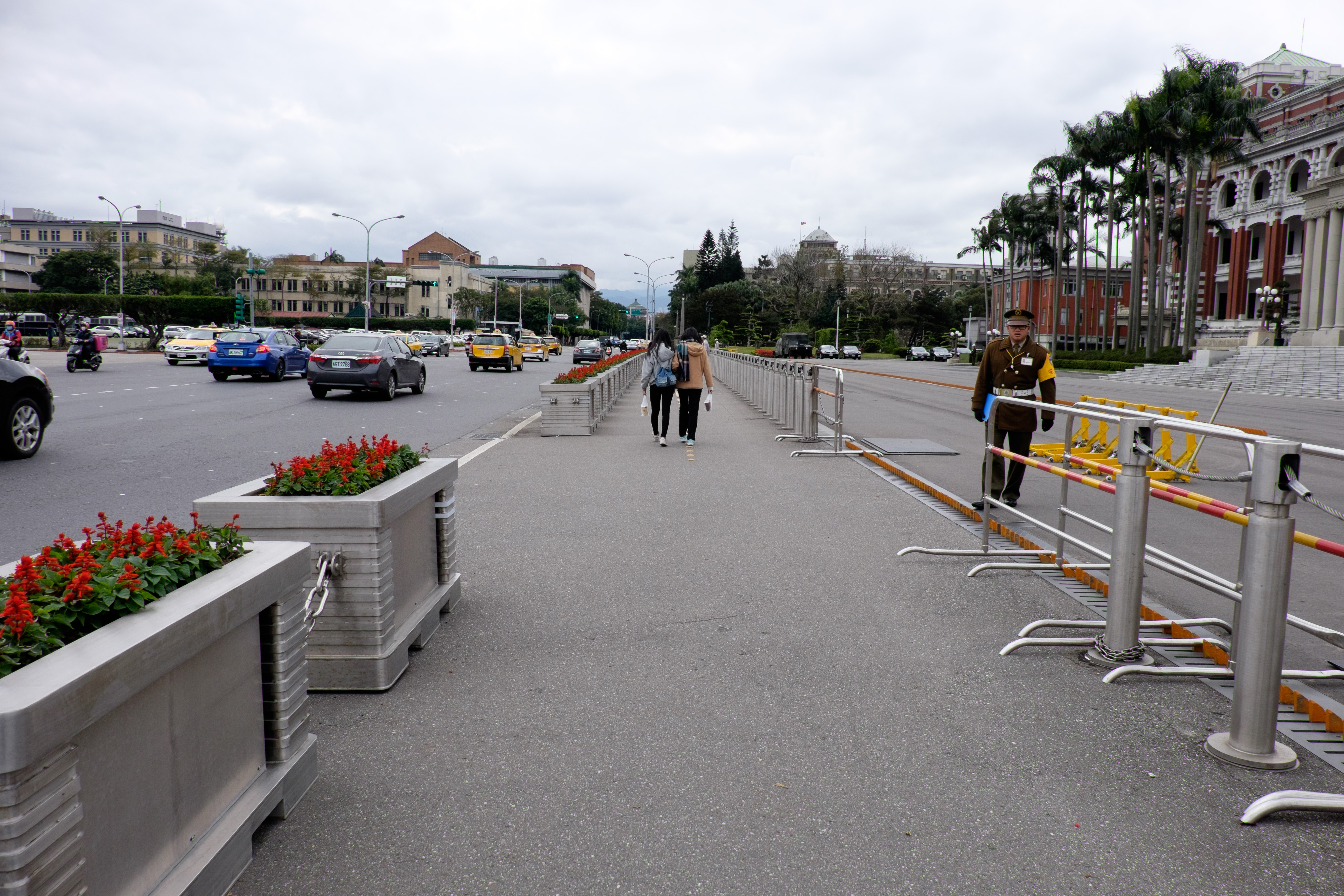 2014年1月25日，發生有男性因不滿司法判決、開重型卡車特攻總統府正門的大不祥事件。之後為強化元首與總統府維安，總統府廣場前增設大型水泥花壇與鐵欄杆，以防衝撞。